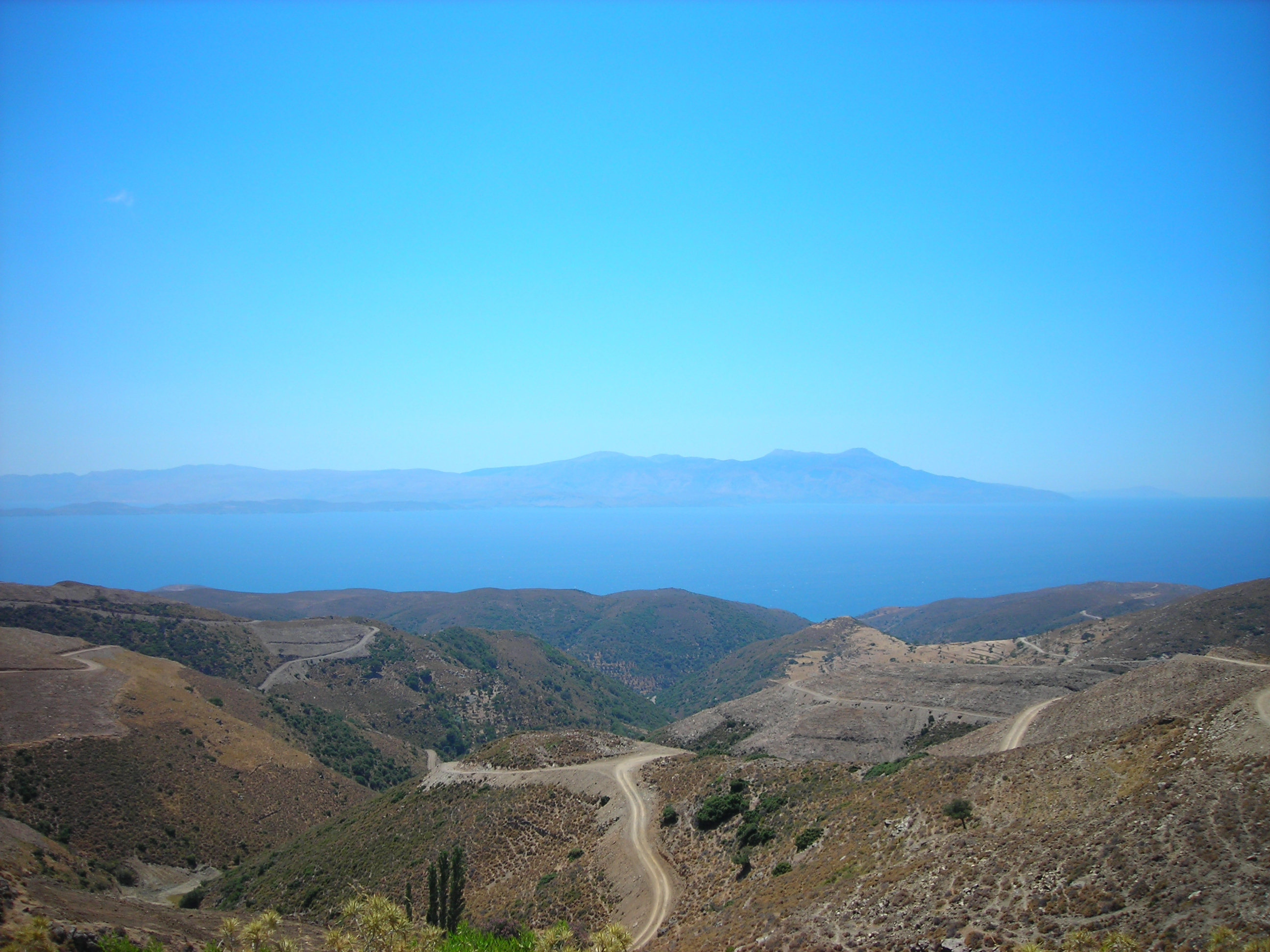 Karaburun Yarımadası'ndan Sakız Adası